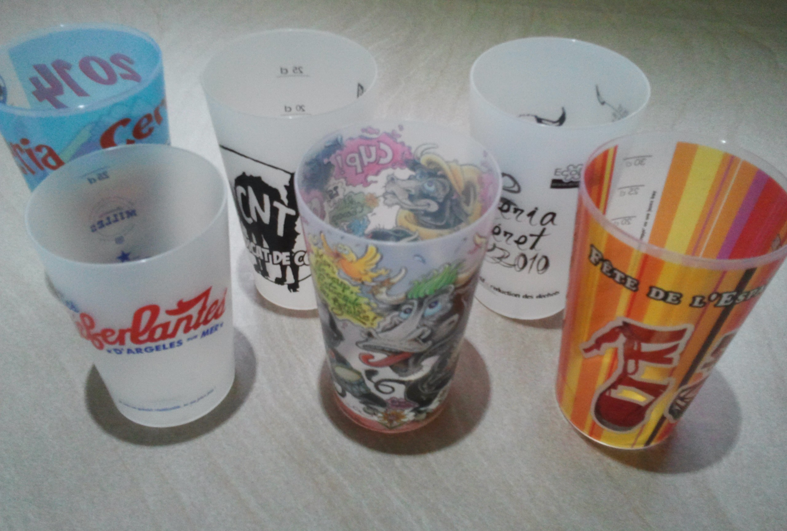 Différents modèles de gobelets Ecocup